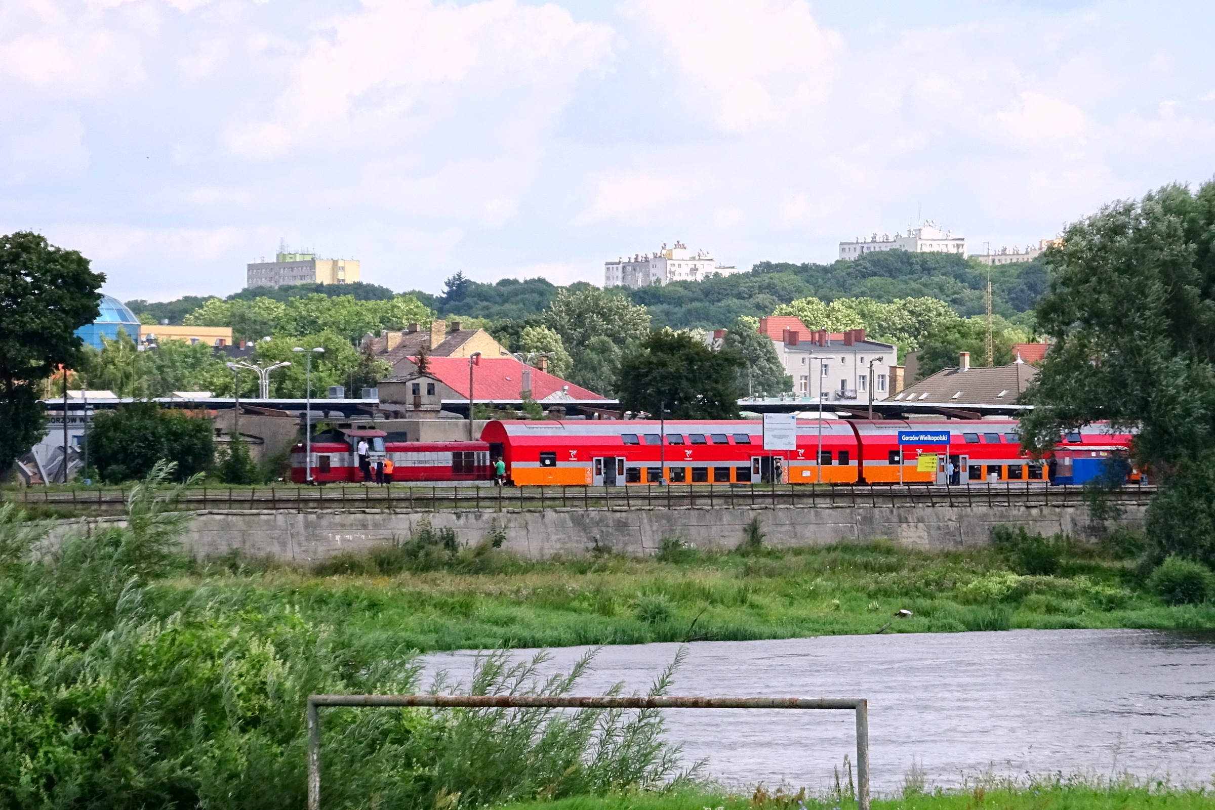 Stacja kolejowa w Gorzowie Wlkp. Peron 4 (warciański) z pociągiem POLREGIO do Kostrzyna (wagony DBme w nowym malowaniu).